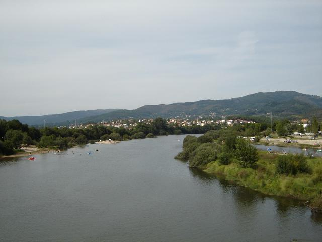 Rio Lima, Portugal.